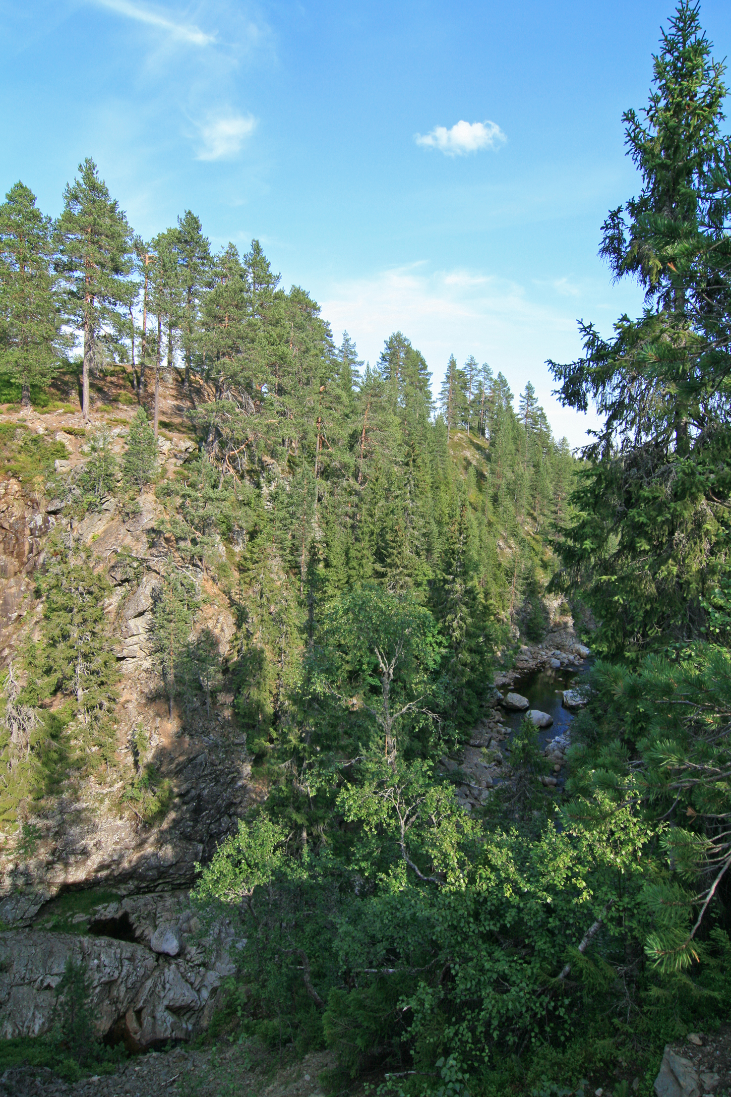 Korpreiret i Øksna, Løten, Hedmark.